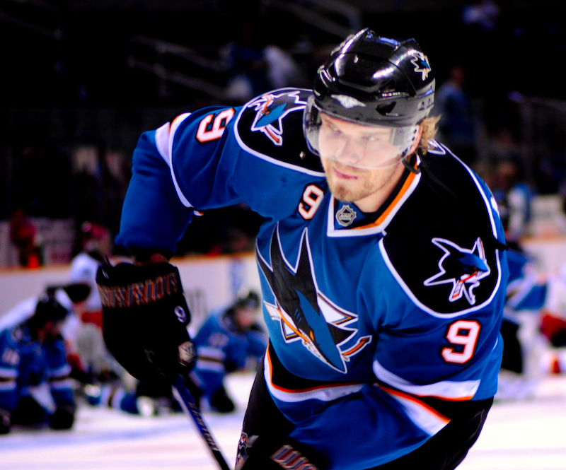 Milan Michalek